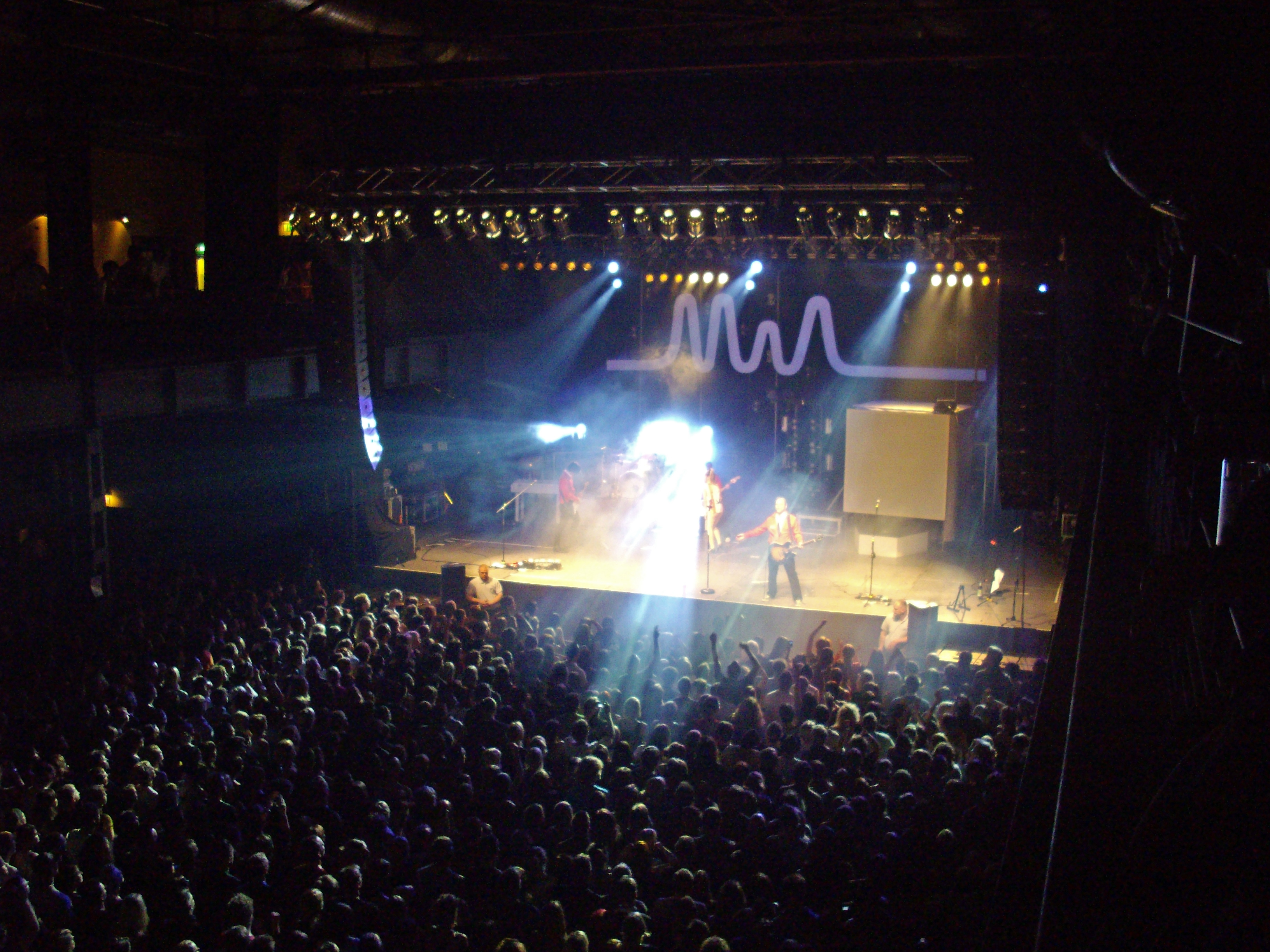 MIA. mit der Vorband Paulsrekorder am 14.02.2009 im Palladium Köln bei der Willkommen im Club - Tour.